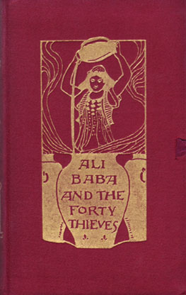 Illustration von H. Granville Feil